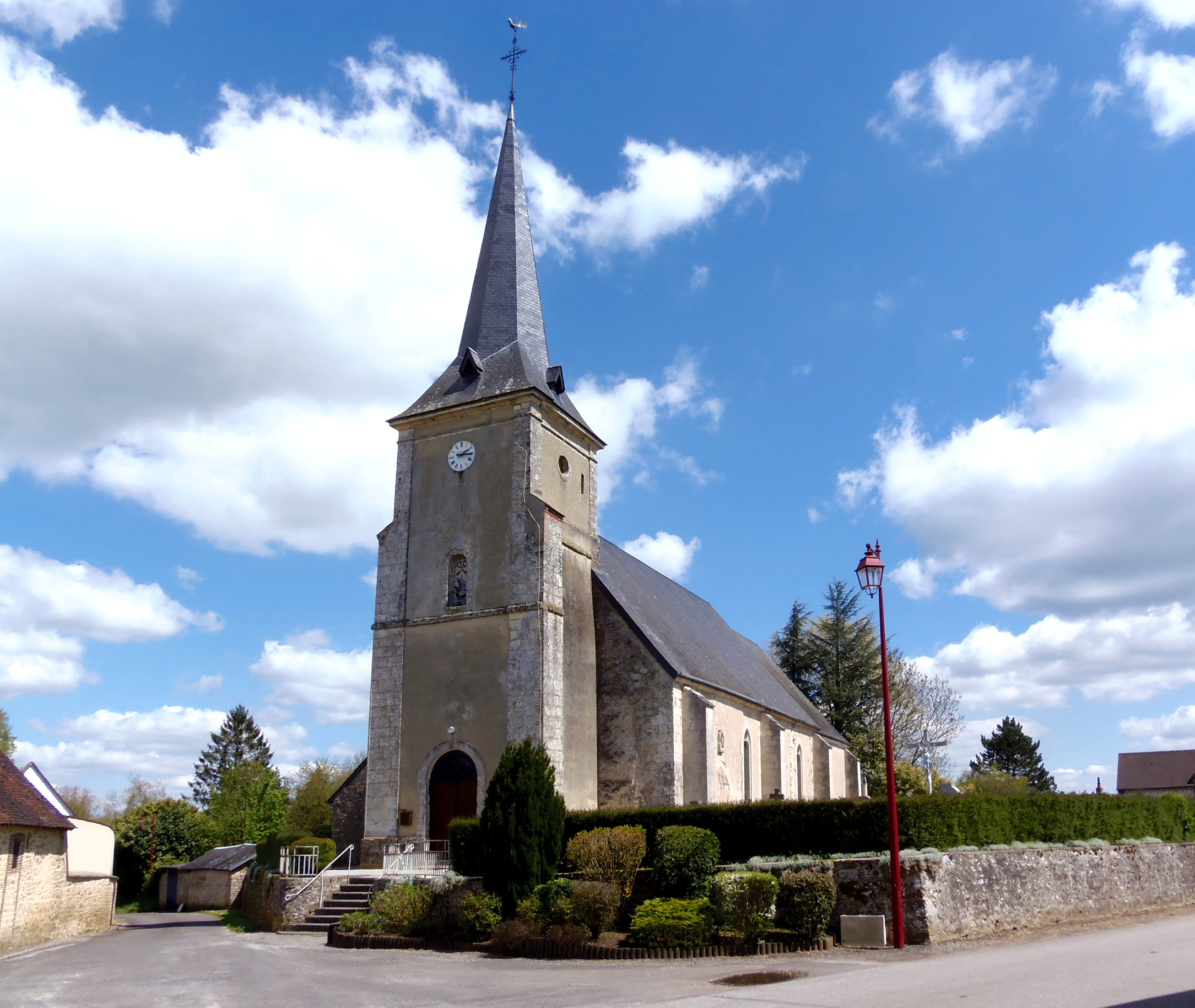 Montchevrel (Normandie, France). L'église Saint-Pierre.